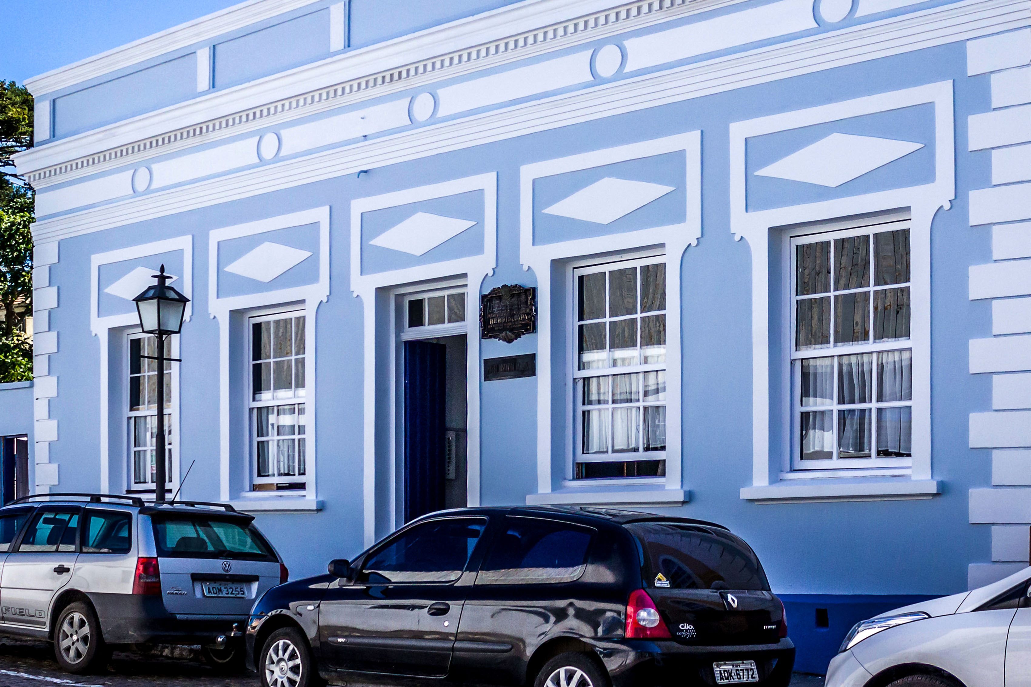 Lapa, PR: conjunto arquitetônico e paisagístico